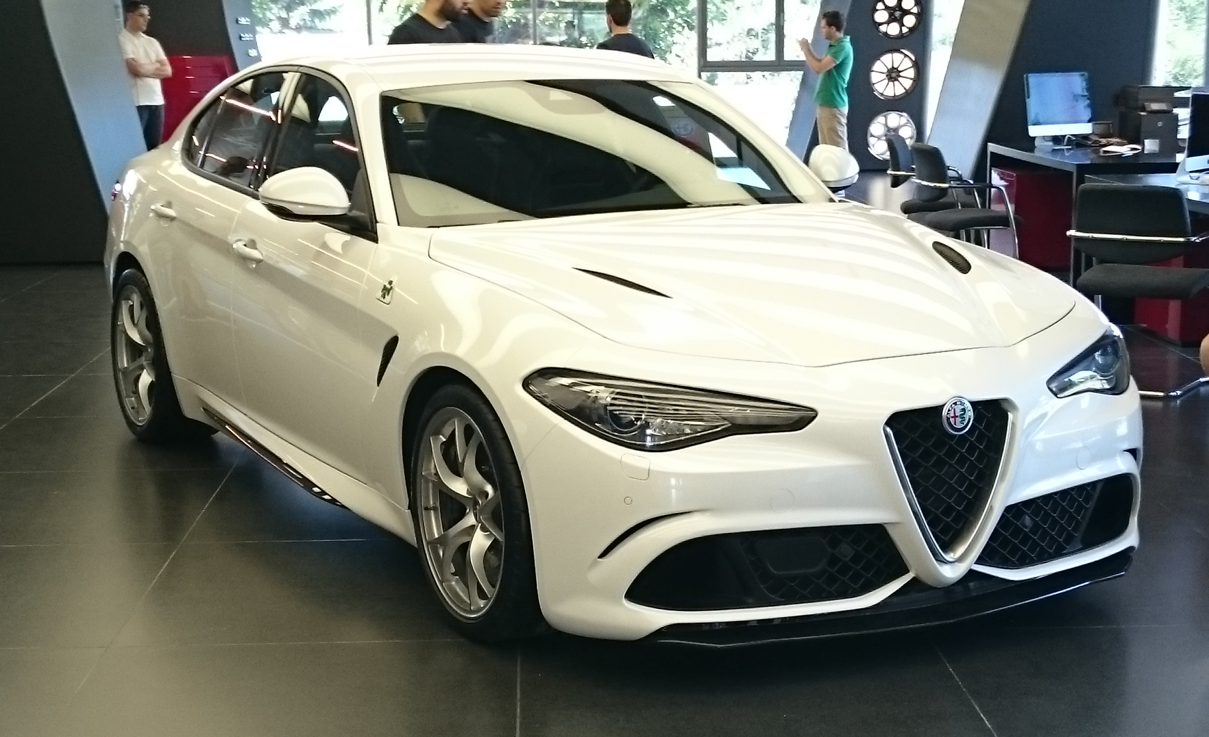 Un modello pre-serie della Alfa Romeo Giulia Quadrifoglio Verde esposta al Museo Alfa Romeo di Arese, Milano